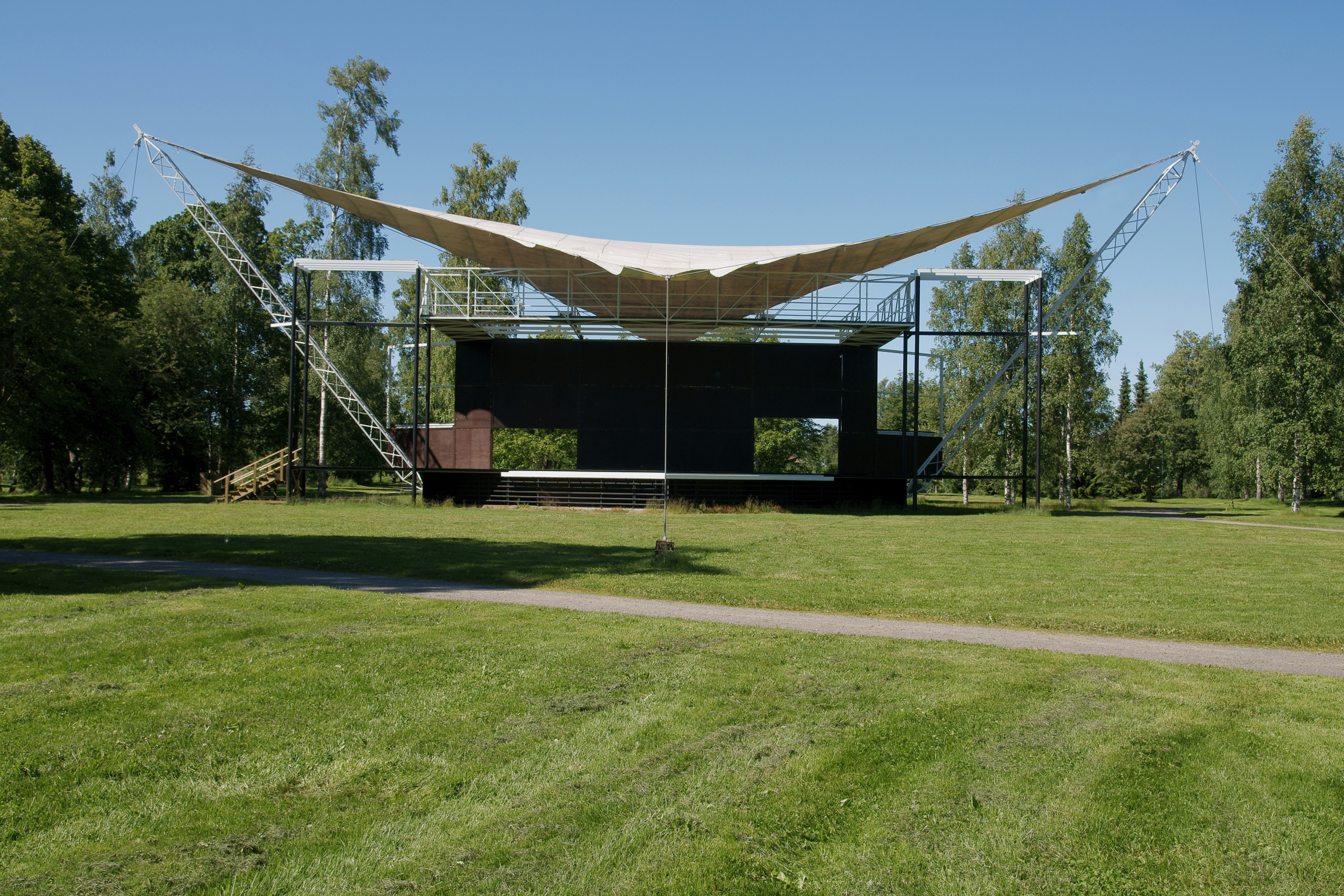 Lintulava Kirjurinluodossa.